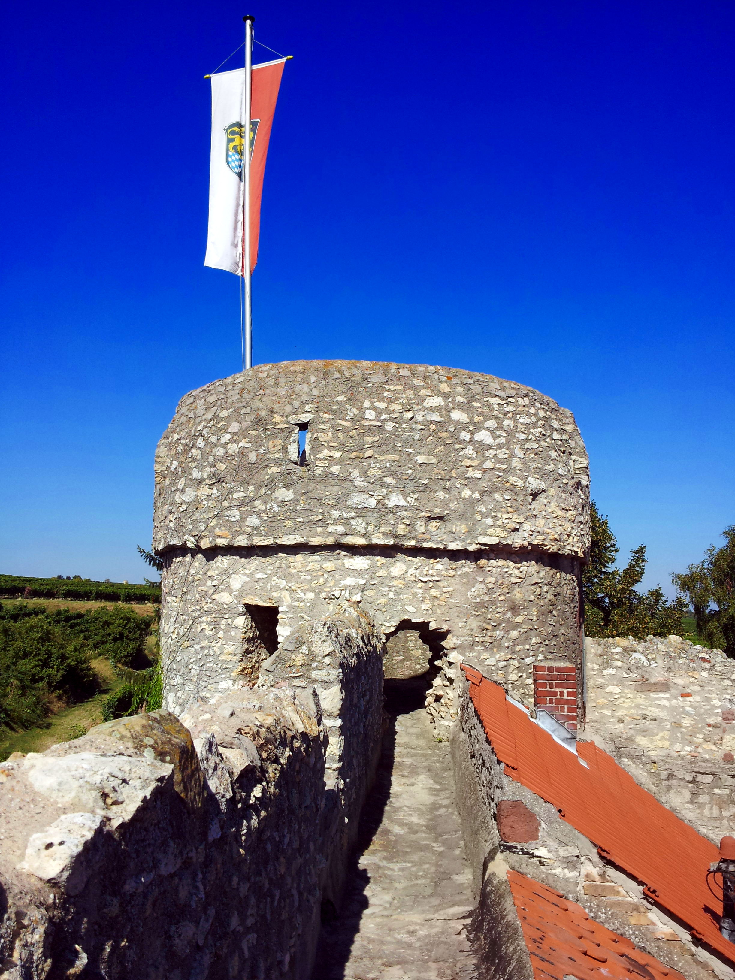 Turm der Fleckenmauer